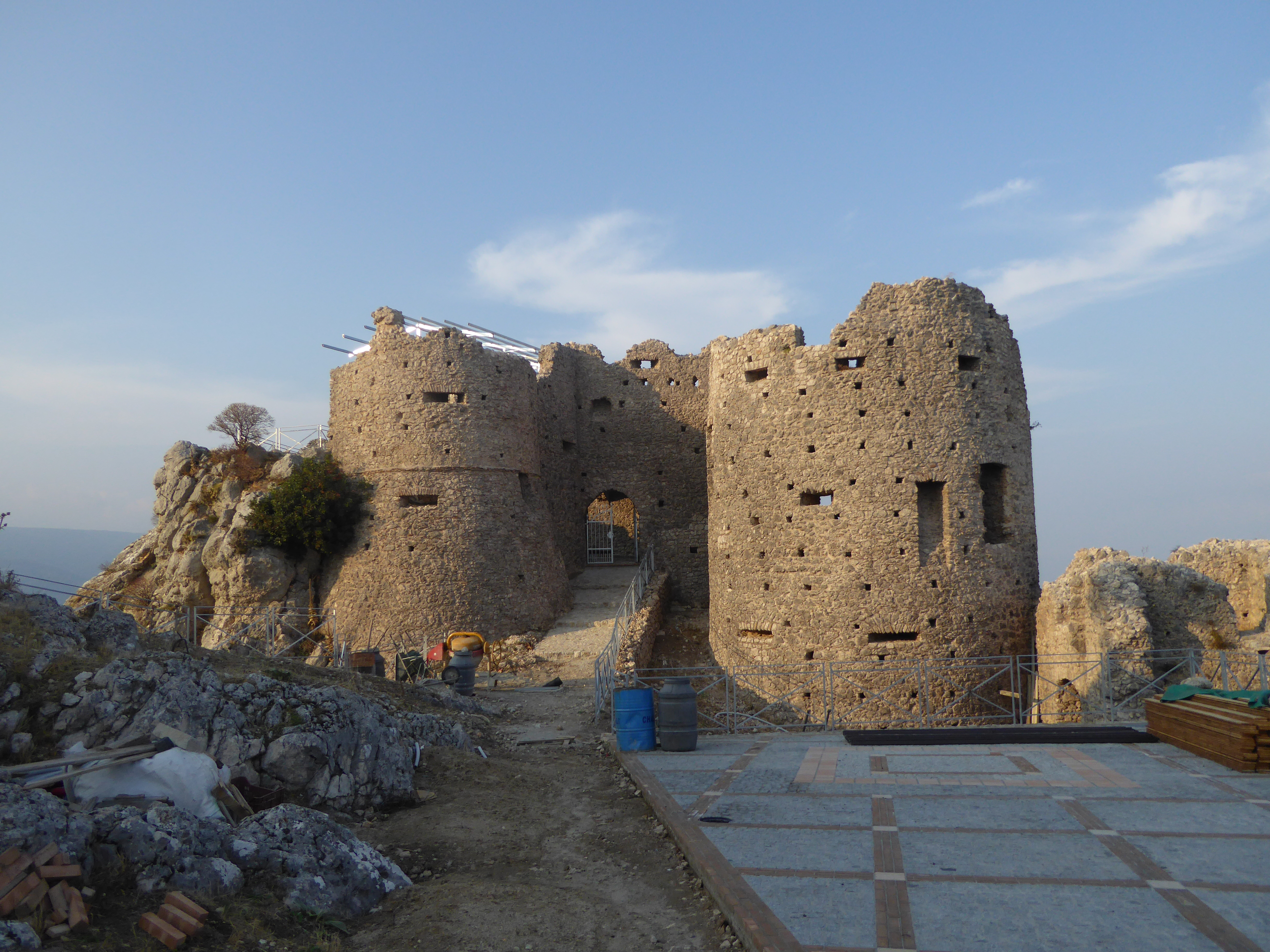 Castello normanno di Stilo ad agosto 2015 sotto restauro